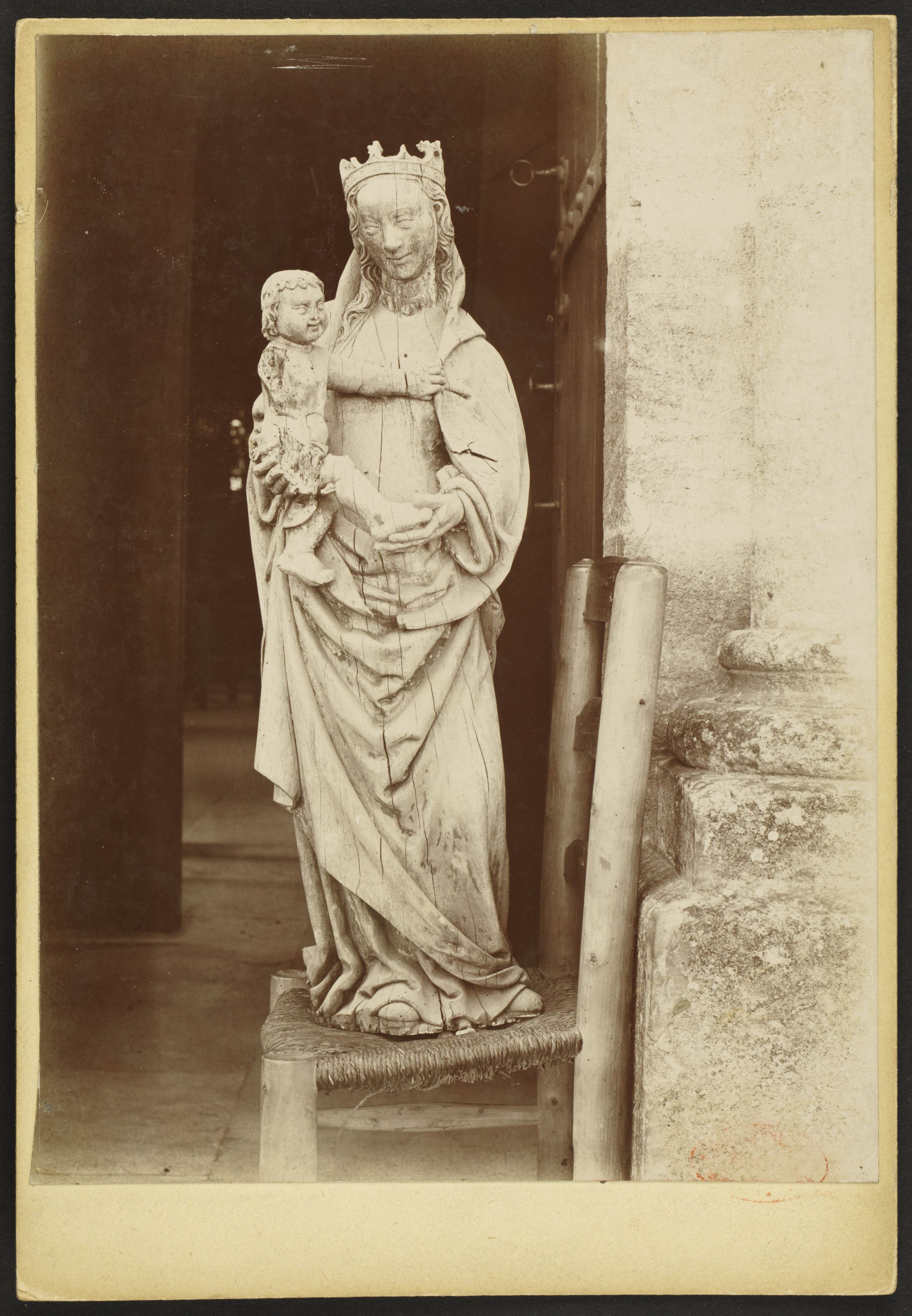 vierge et enfant (bois); sujet : Guillos